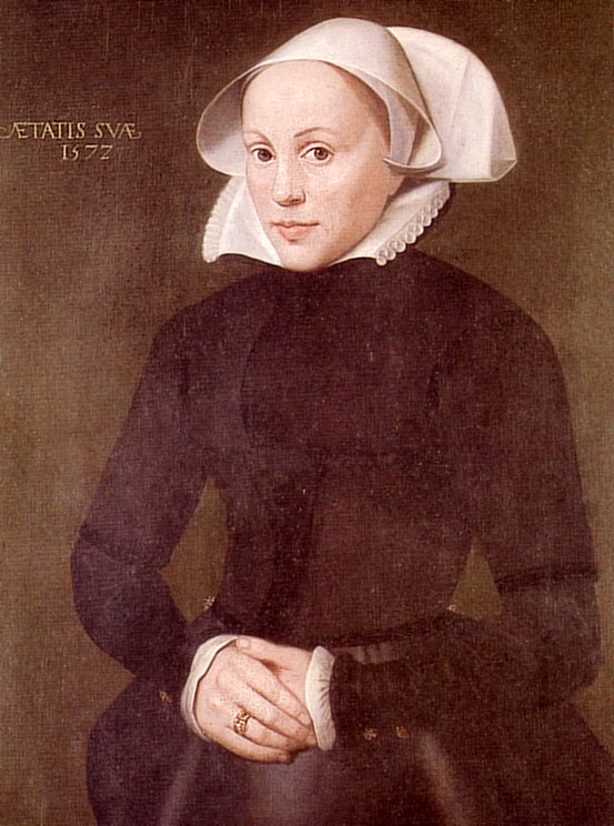 Maria von Jever, im Jeverland als Fräulein Maria bekannt (Schlossmuseum Jever)